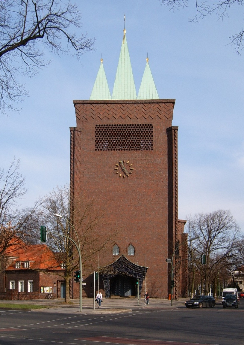 Evangelische Kreuzkirche in Berlin-Schmargendorf